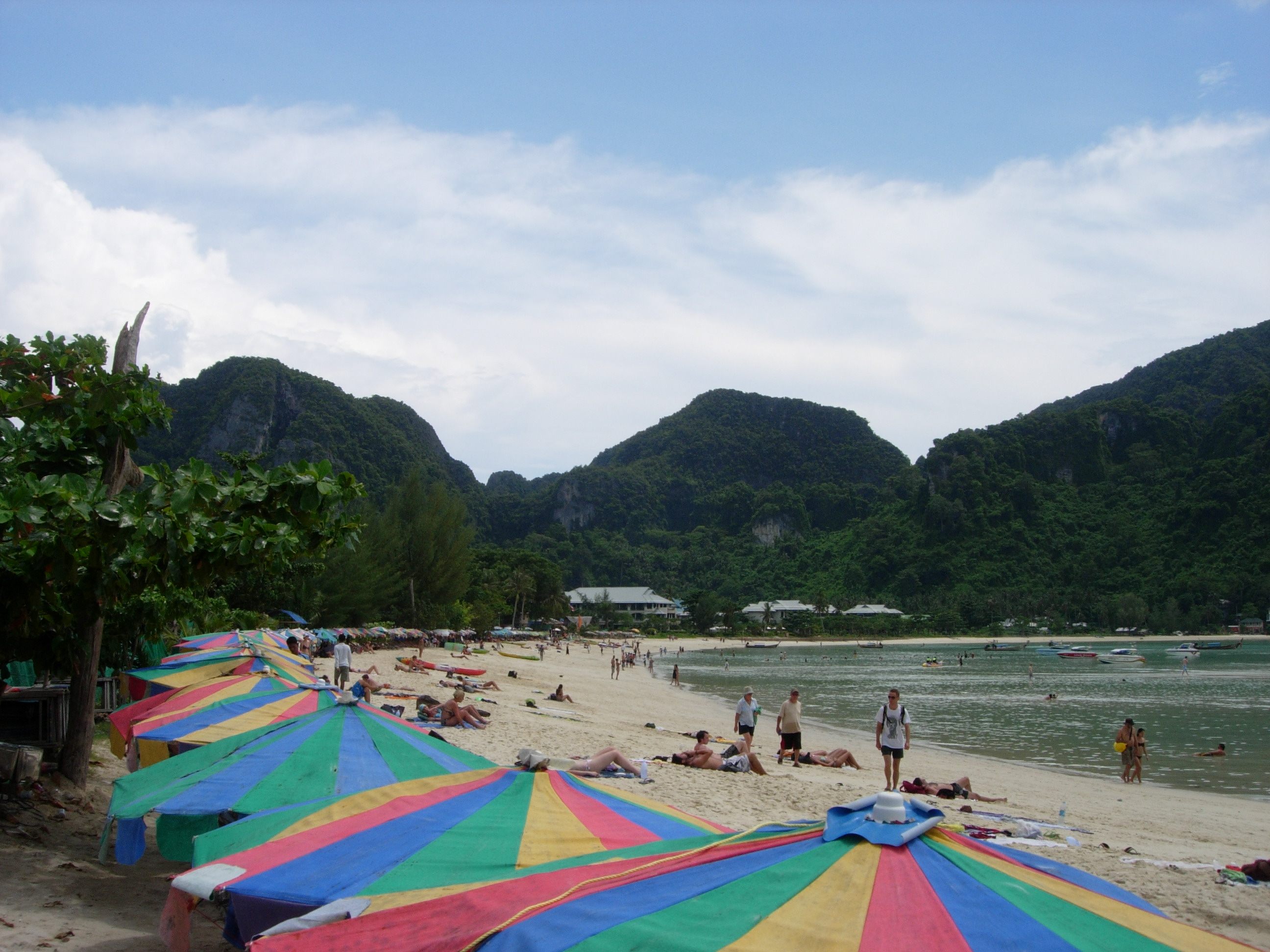 大皮皮岛的罗达拉木湾